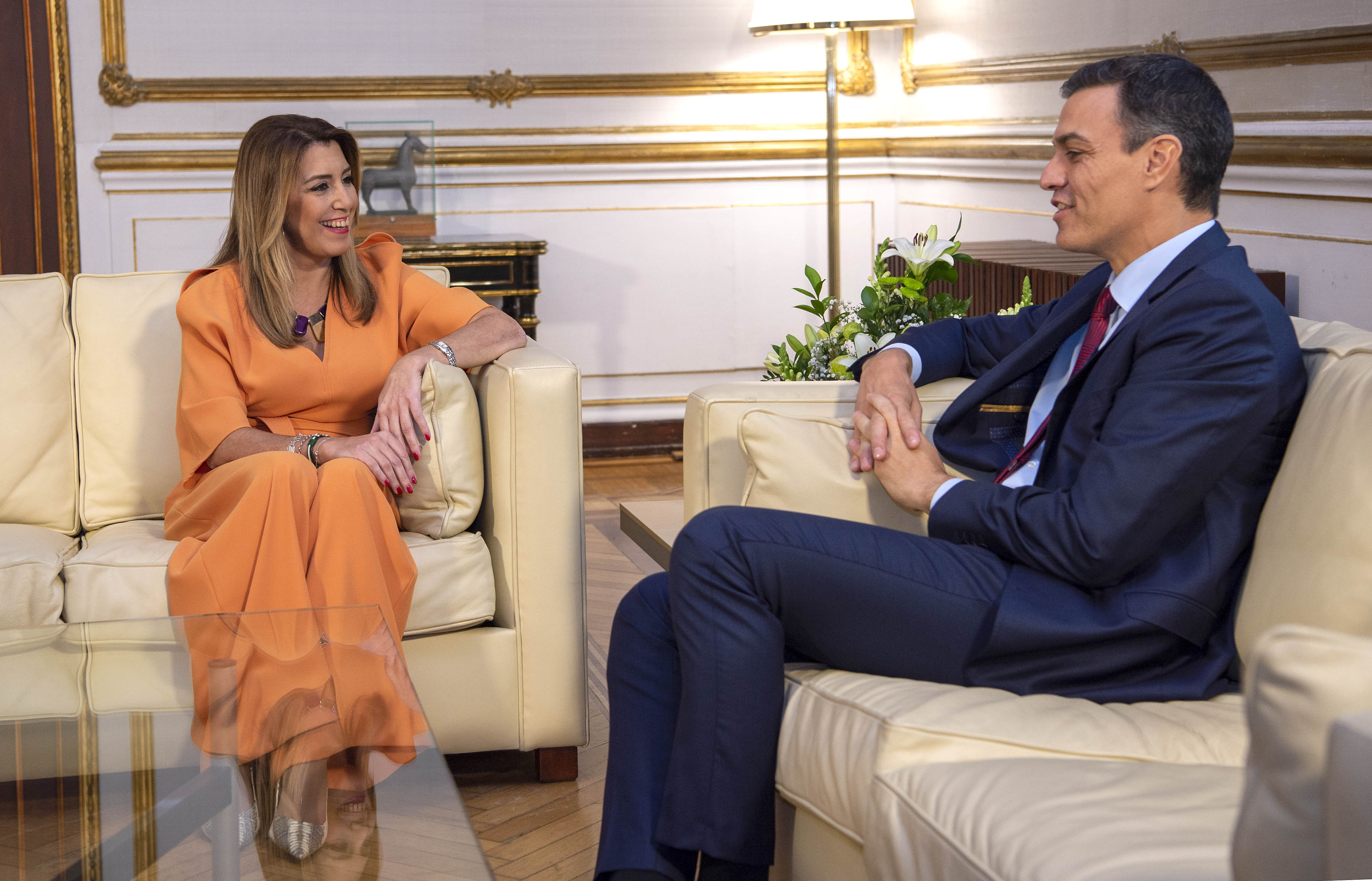 Encuentro de Pedro Sánchez con Susana Díaz en el San Telmo.